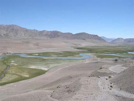 Murgab.